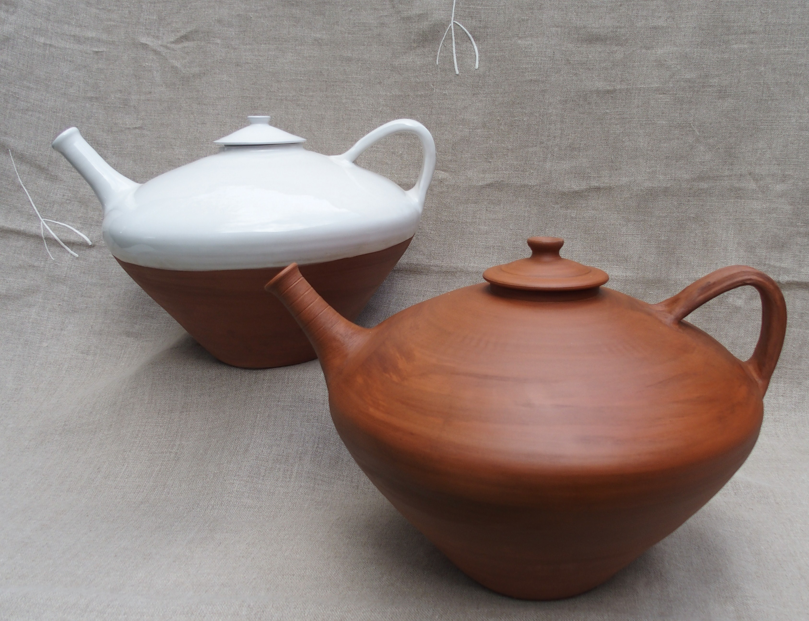 Pegarra